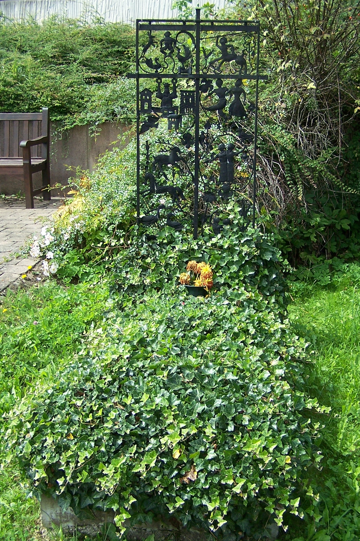 Ansicht des Künstlergrabes von Riccardo Dölcker (1896-1955). Er lebte und arbeitete als Textilgestalter im OT Kohlgraben. Das aus Eisenblech in scherenschnittartigen Mustern gestaltete Grabdenkmal steht heute dicht bei der Kirche.